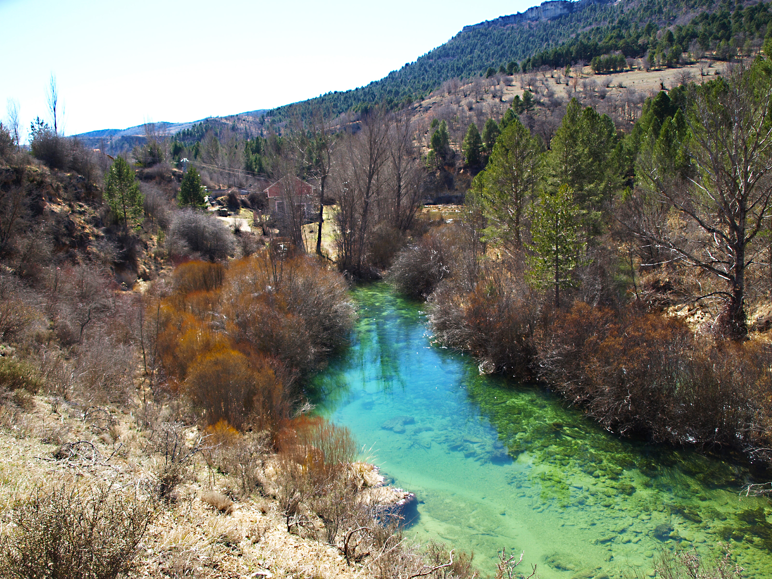 Alto Tajo This is a photography of a Special Area of Conservation in Spain with the ID: ES4240016. Natura2000 entry, EEA entry